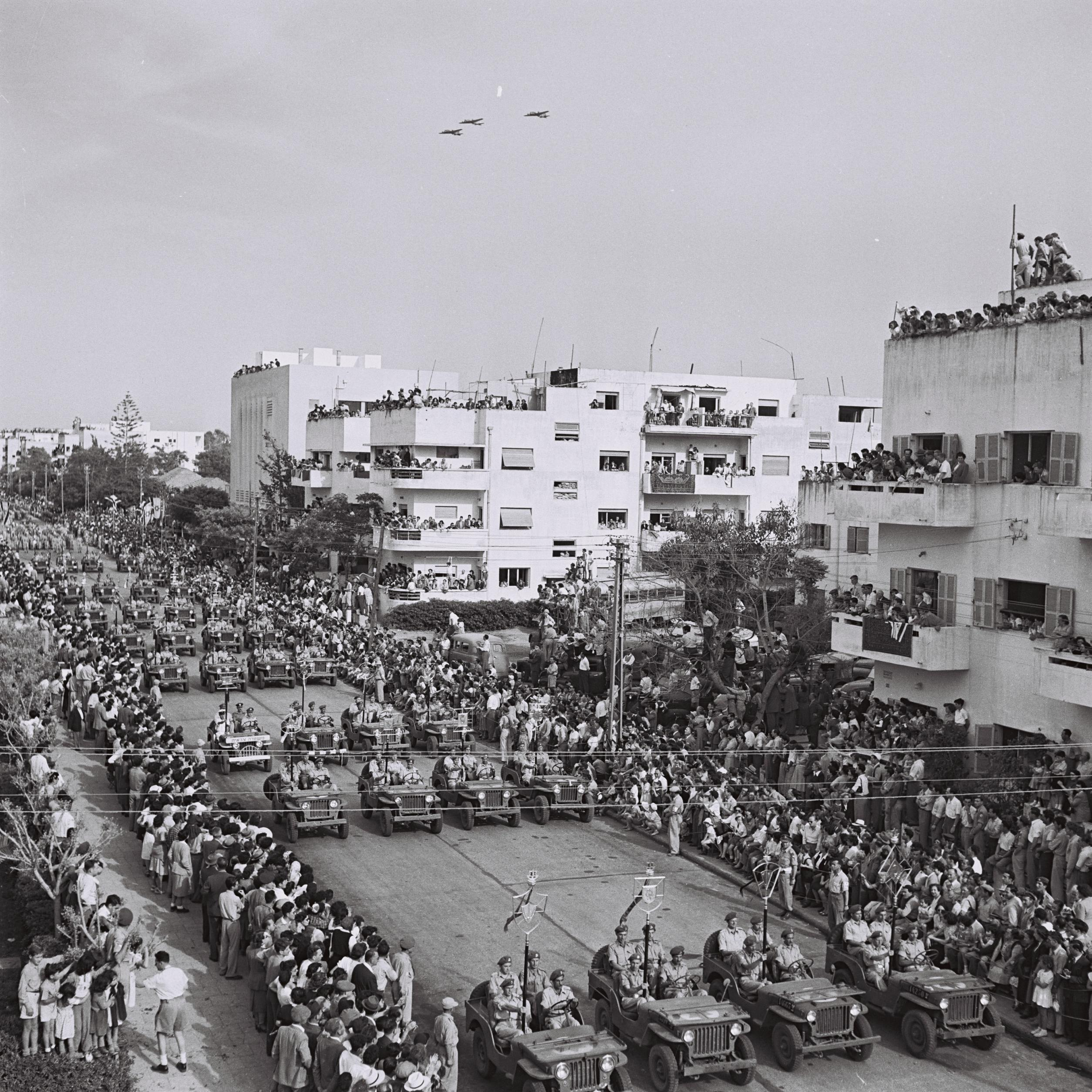 Independence Day Parade in the streets of Tel Aviv. מצעד יום העצמאות ברחובות תל אביב Photo: BRAUNER TEDDY, 04/30/1952